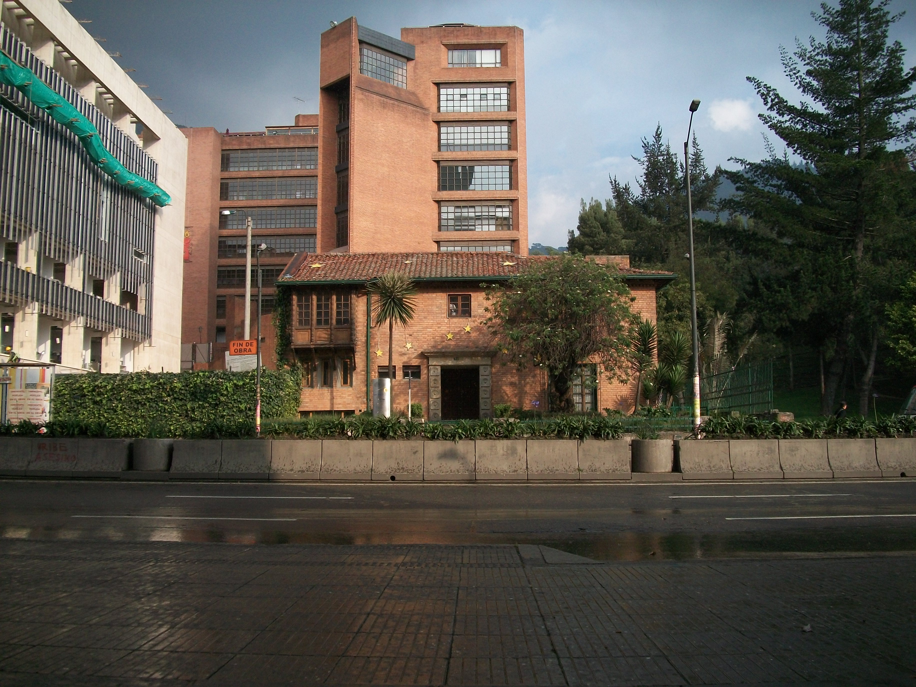 Universidad Jariana, Bogotá D. C. Carrera Séptima.